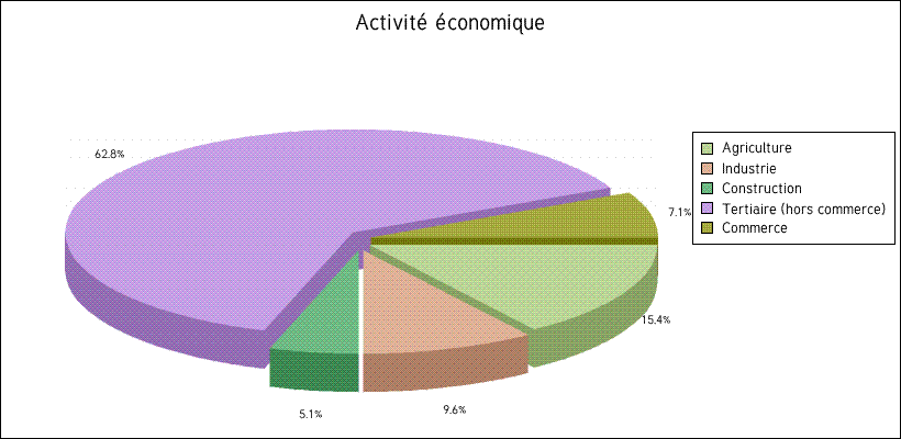 graphique activité économique de Grambois